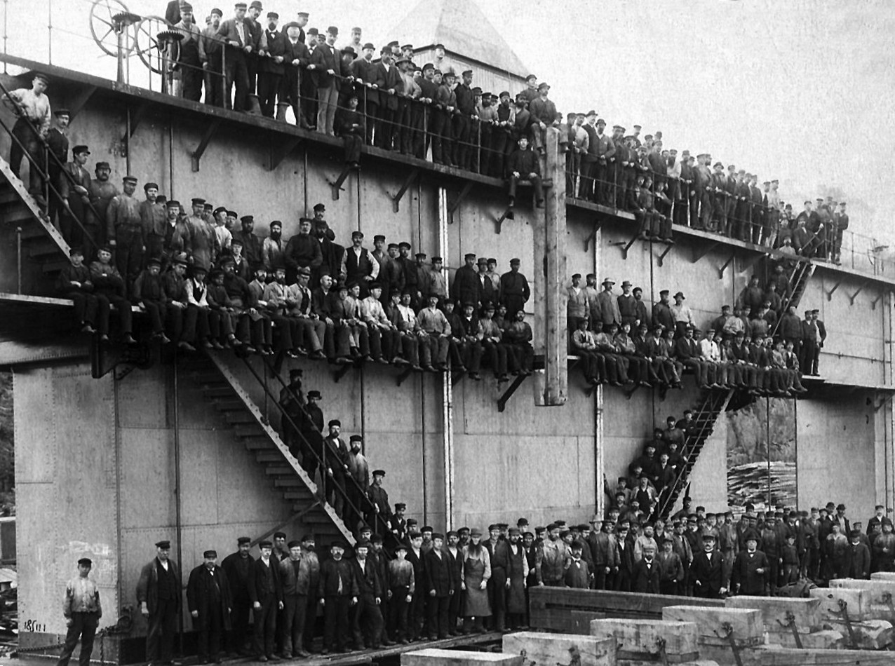 Södra Varvet. Varvsarbetarna samlade vid det färdigbyggda fartyget, vars namn är oidentifierat